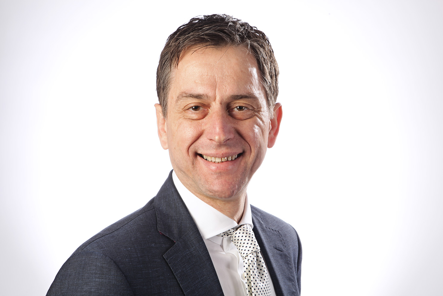 Servais Verherstraeten, Belgische politicus voor CD&V